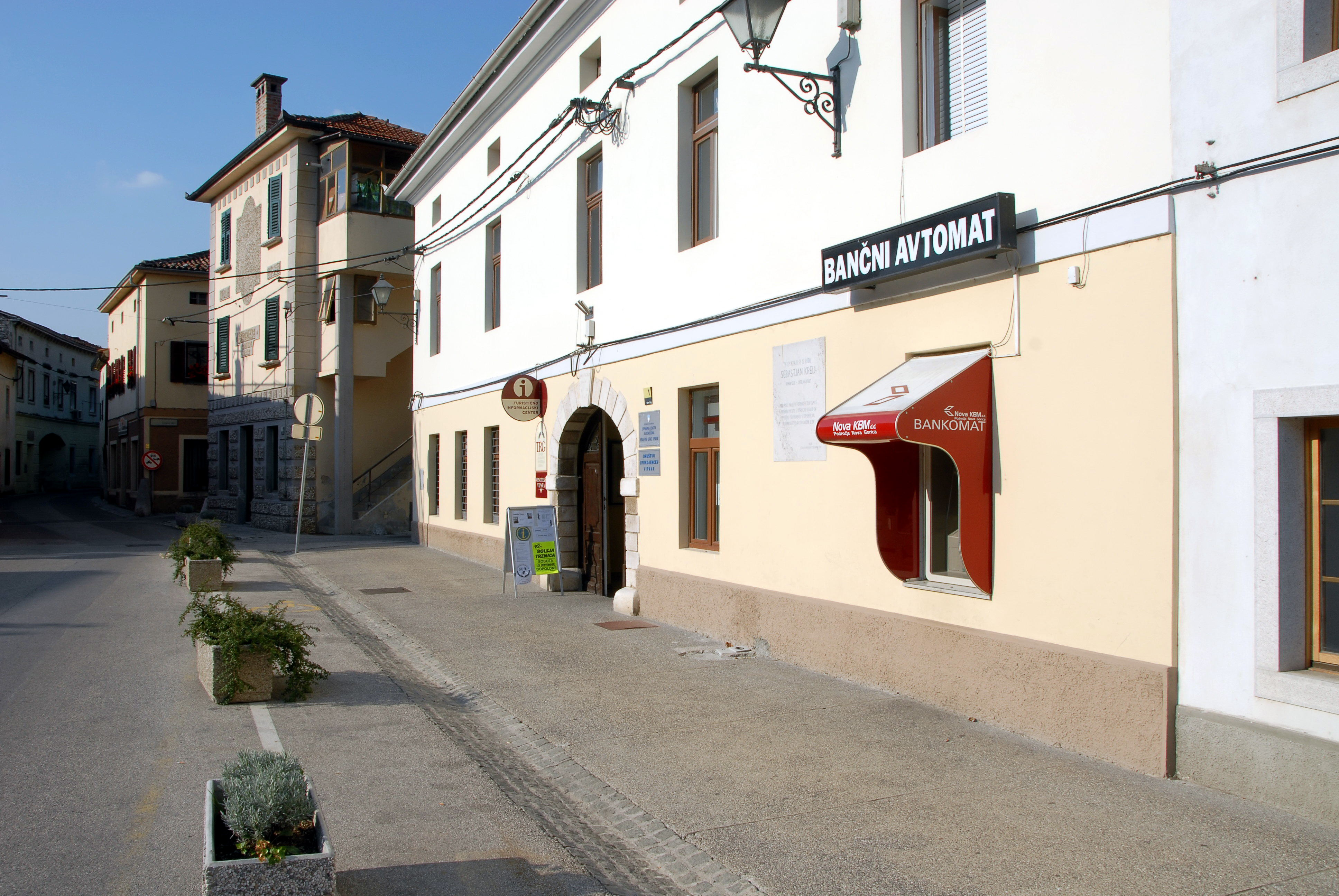 Birthplace of Sebastian Krelj in Vipava, Goriska, Slovenia